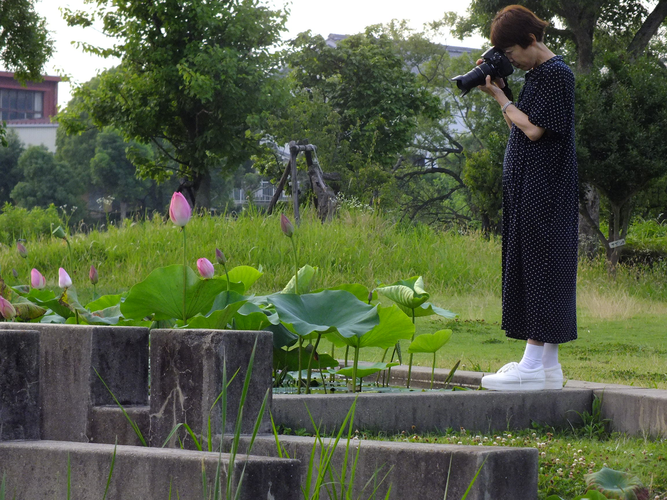 Hiraike-park (平池公園 大賀ハス)兵庫県加東市東古瀬